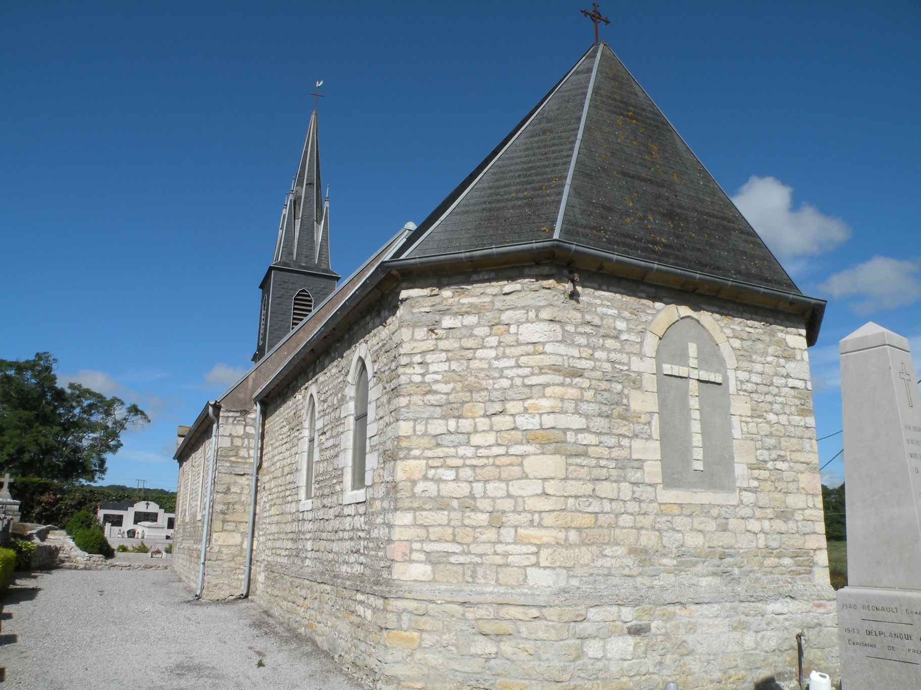 L'église d'Offrethun.